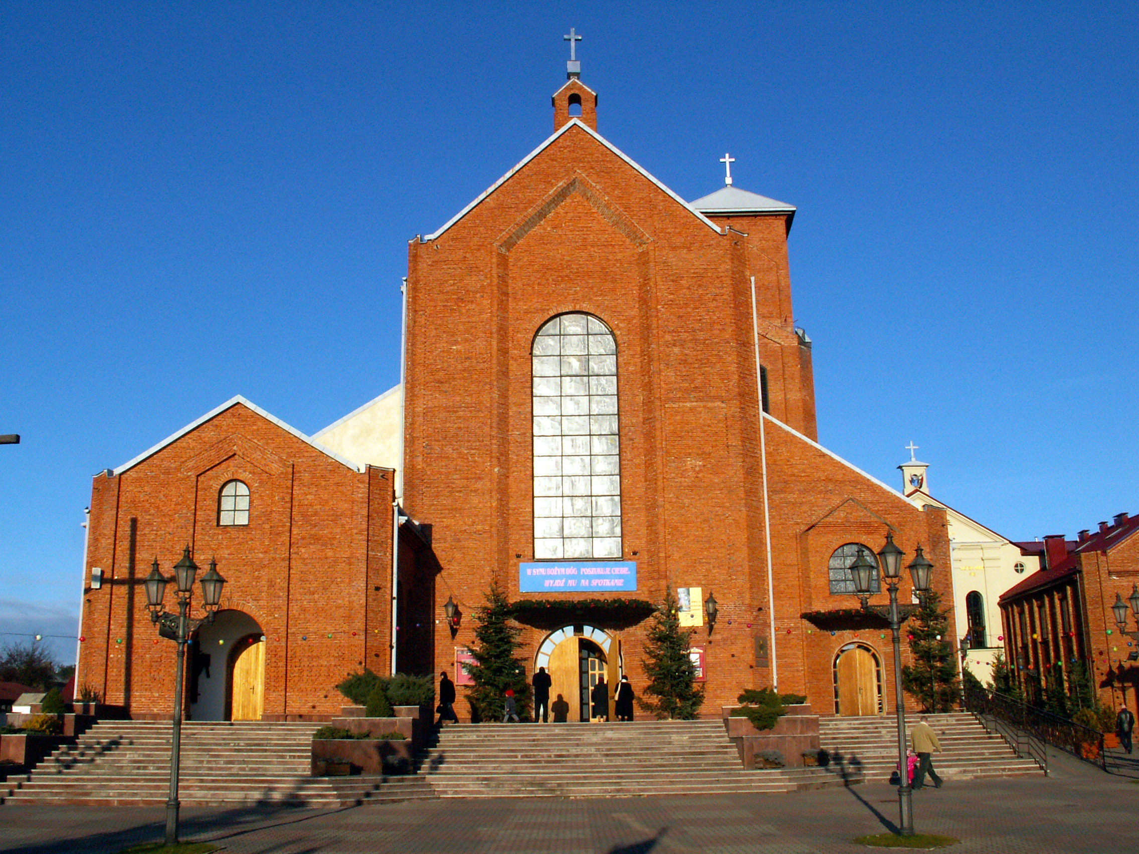 Matka Boska Ostrobramska Sanctuary in Skarżysko-Kamienna, Poland